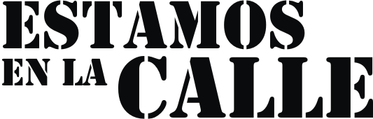 Logo de texto usando la fuente libre de CorelDraw llamada "Stencil".